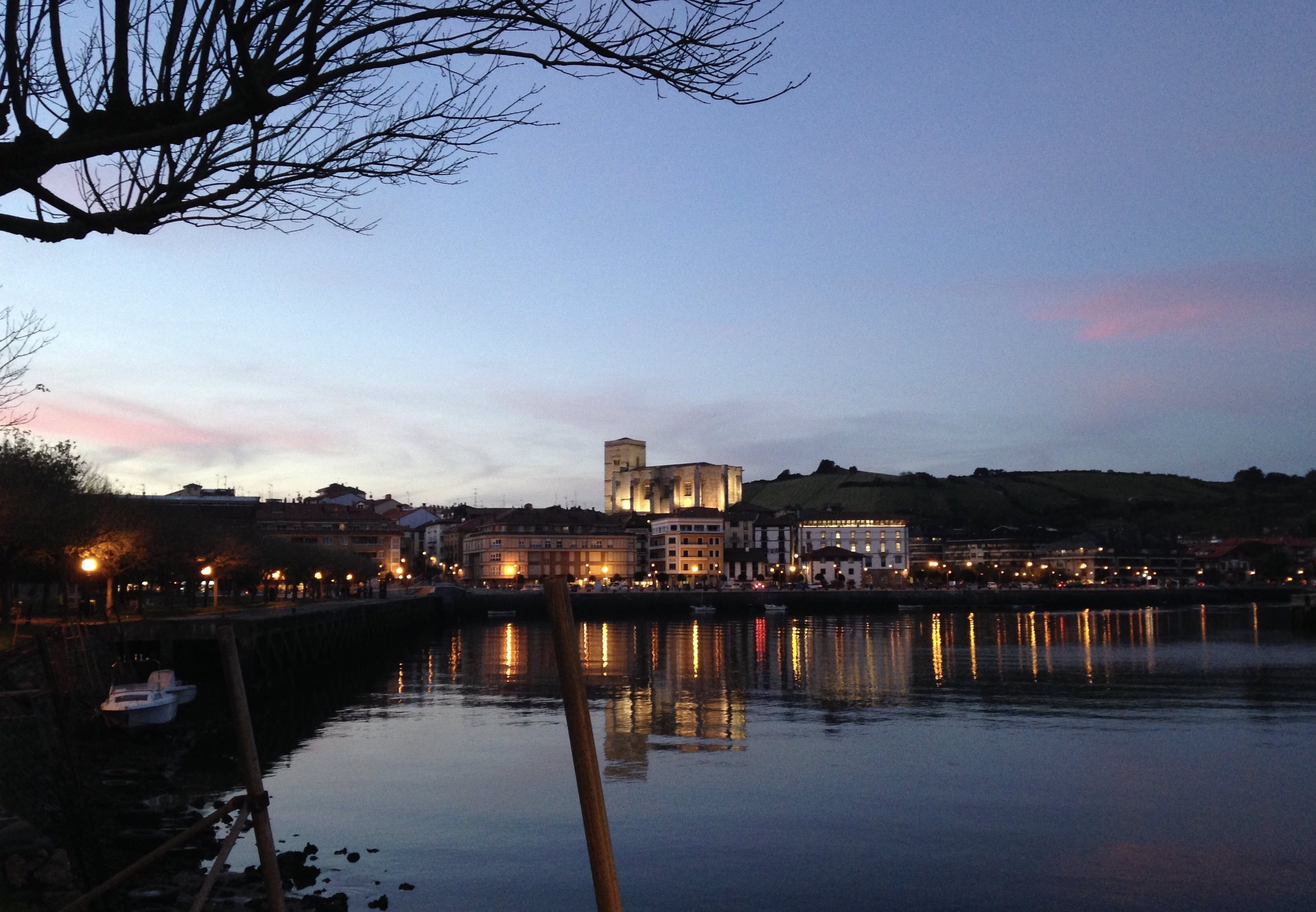 San Pedro elizaren urrutiko ikuspegia ilunabarrean, Zumaia (Gipuzkoa)